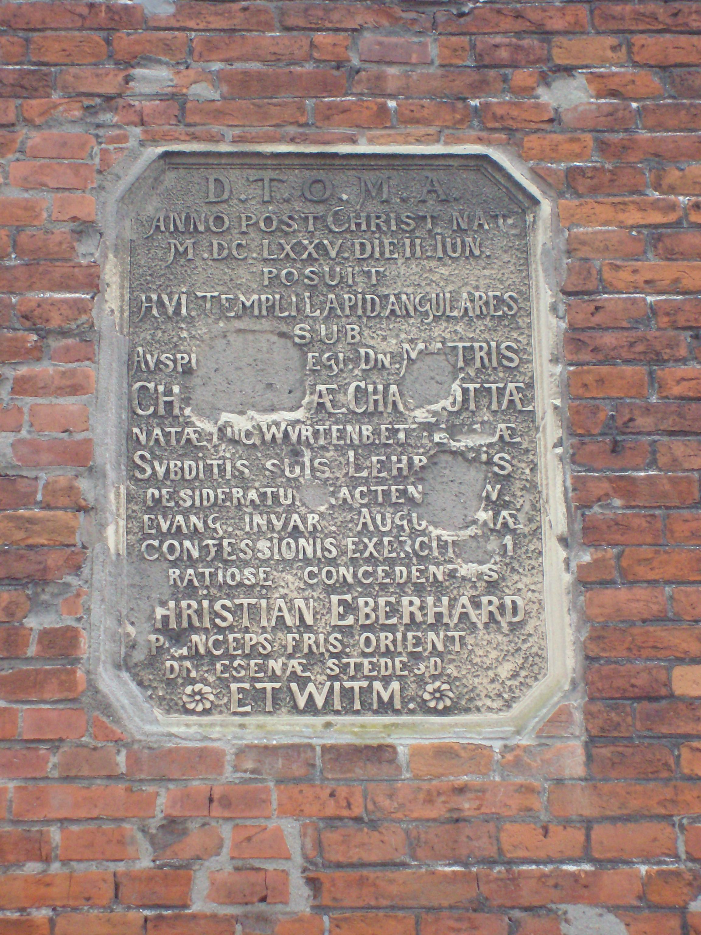 Bauinschrift der Lutherkirche in Leer, Ostfriesland